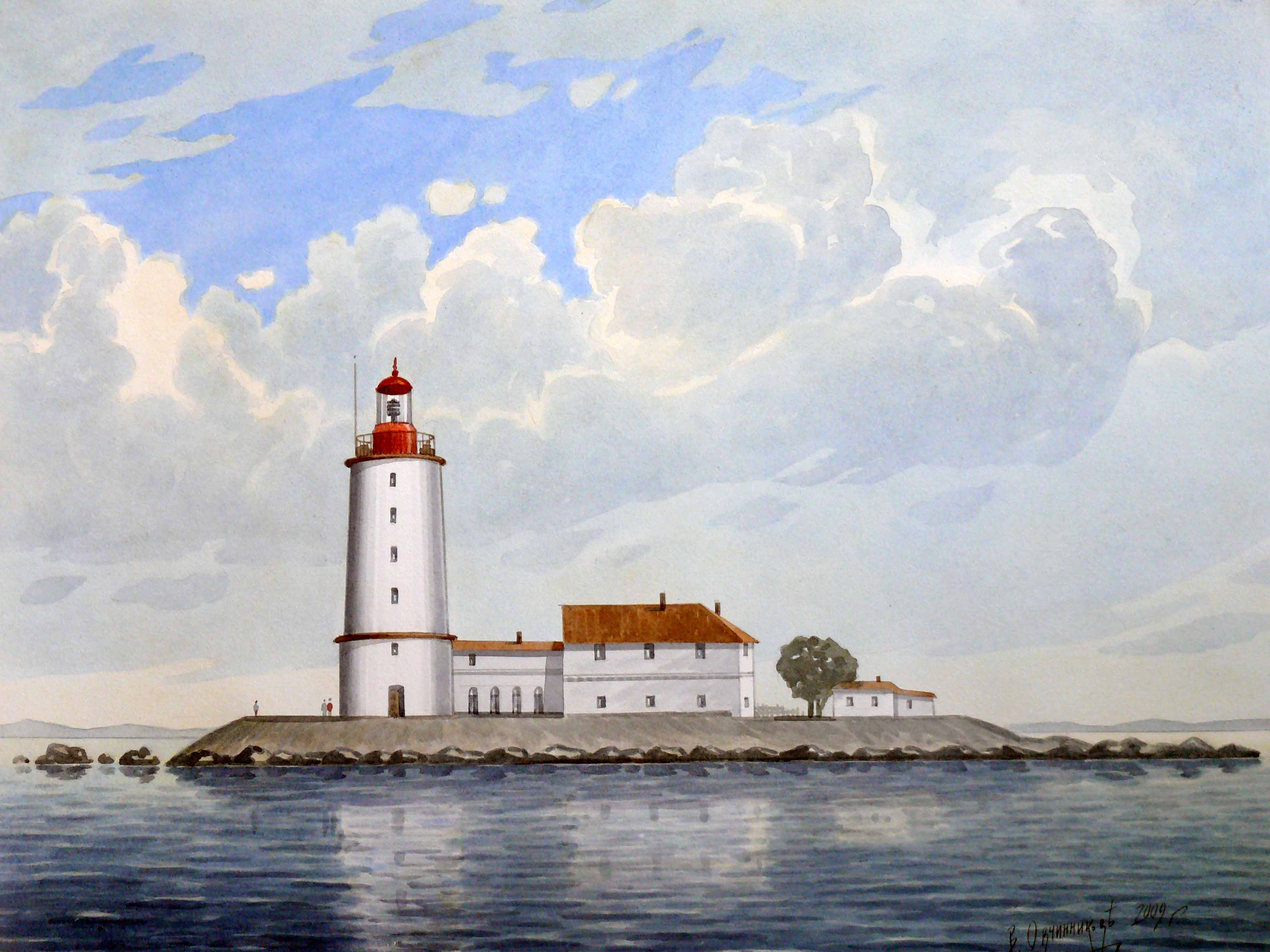 Картина «Маяк Толбухин» Вячеслава Ивановича Овчинникова, год